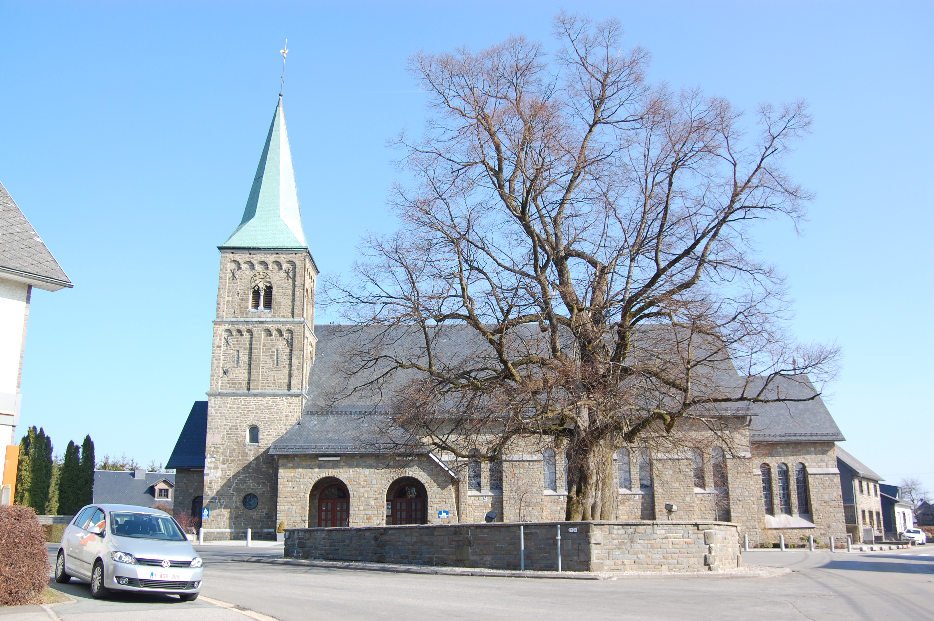 Walon: Wévurcé : eglijhe et vî tiyoû